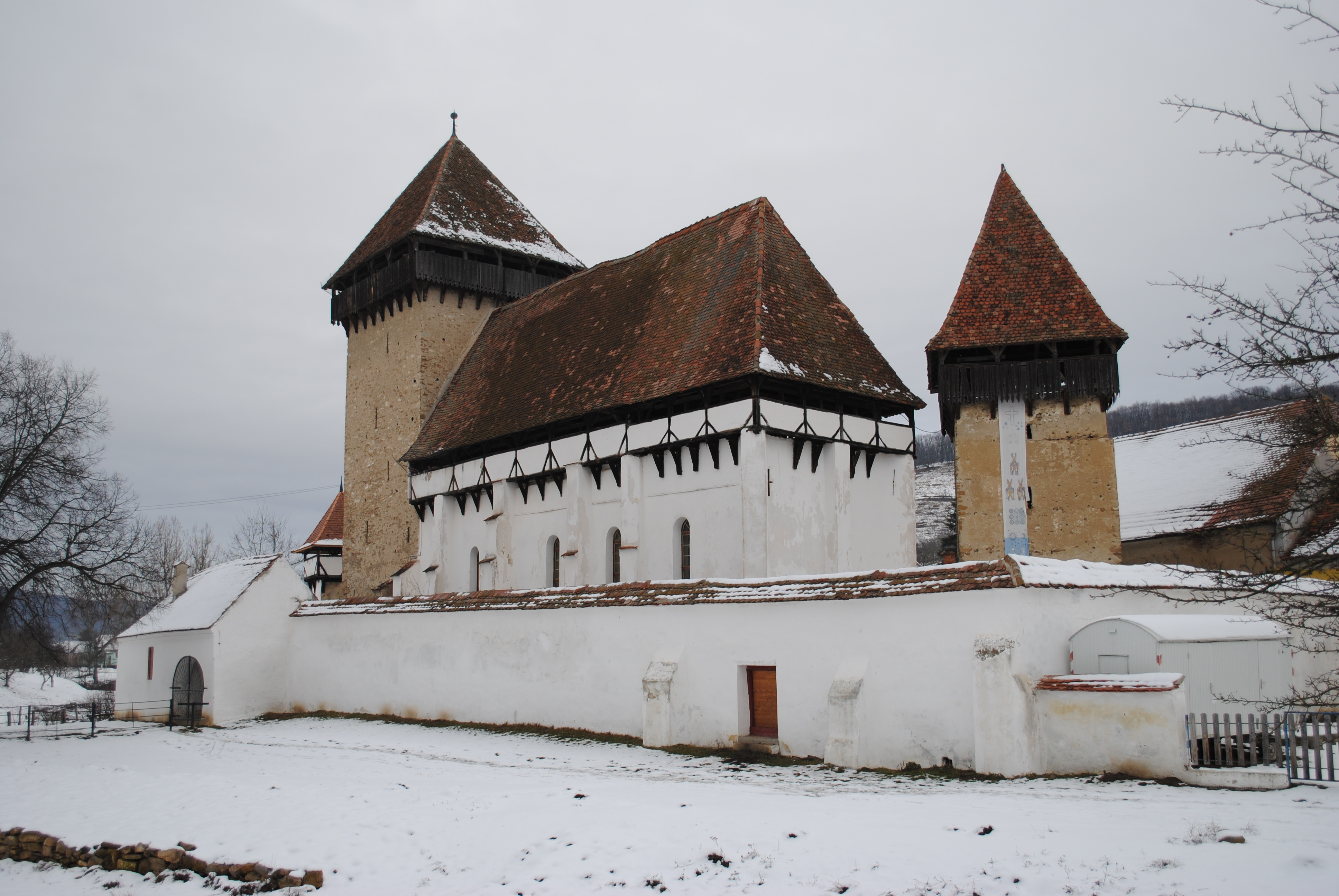 Ansamblul bisericii evanghelice fortificate, sf. sec. XV - sec. XIX